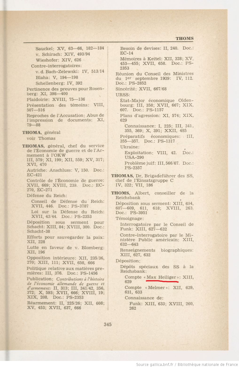 Max Heiliger » est un nom fictif créé par le Troisième Reich sous l'autorité du président de la Reichsbank, Walther Funk, dans un arrangement secret avec le chef de la Schutzstaffel (SS), Heinrich Himmler. Cette fausse identité est utilisée pour établir des comptes bancaires1 servant à blanchir des objets de valeur volés aux victimes du système nazi (camps de concentration et camps d'extermination).